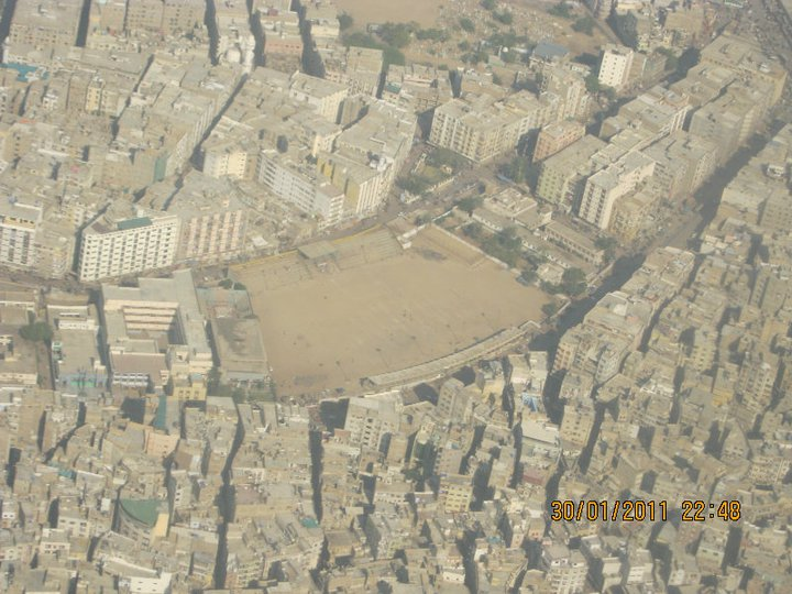 Kakri Ground, Moosa Lane